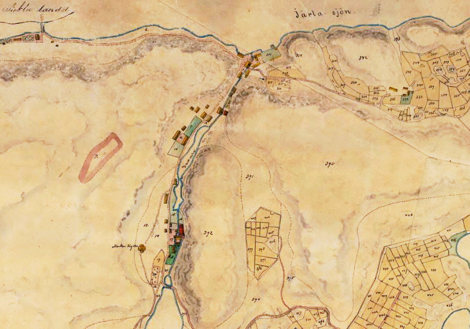 Del av kartan som visar Nacka gård och Nackaån